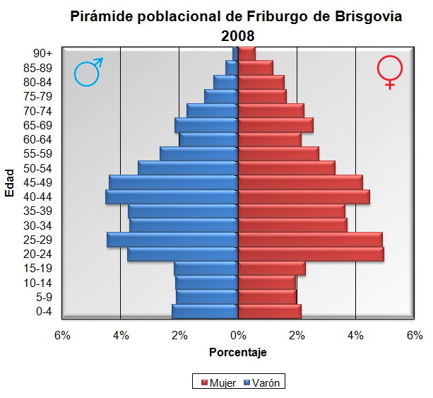 Pirámide poblacional de la ciudad Friburgo de Brisgovia, Alemania. 2008. En azul los hombres y en rojo las mujeres